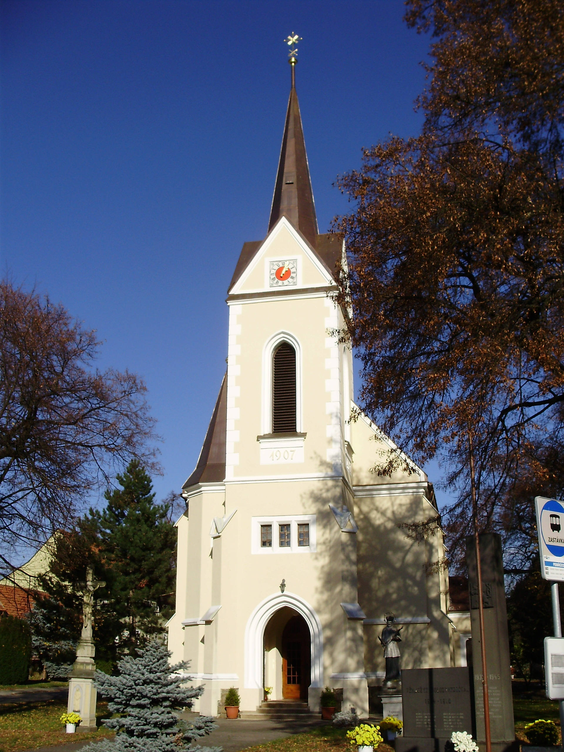 kostel Podbřežice (Vyškov- Czech republic)